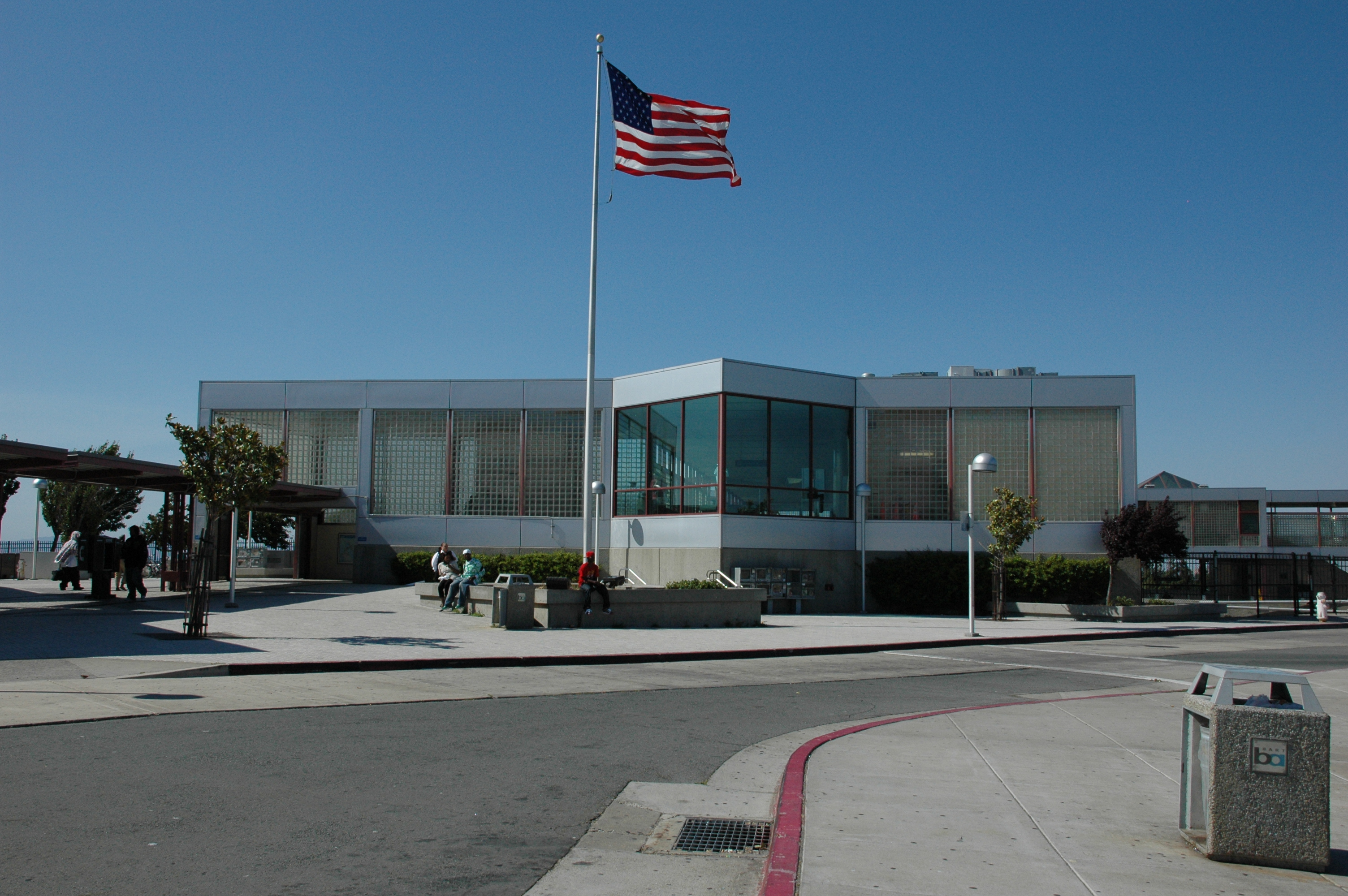 PBBP BART